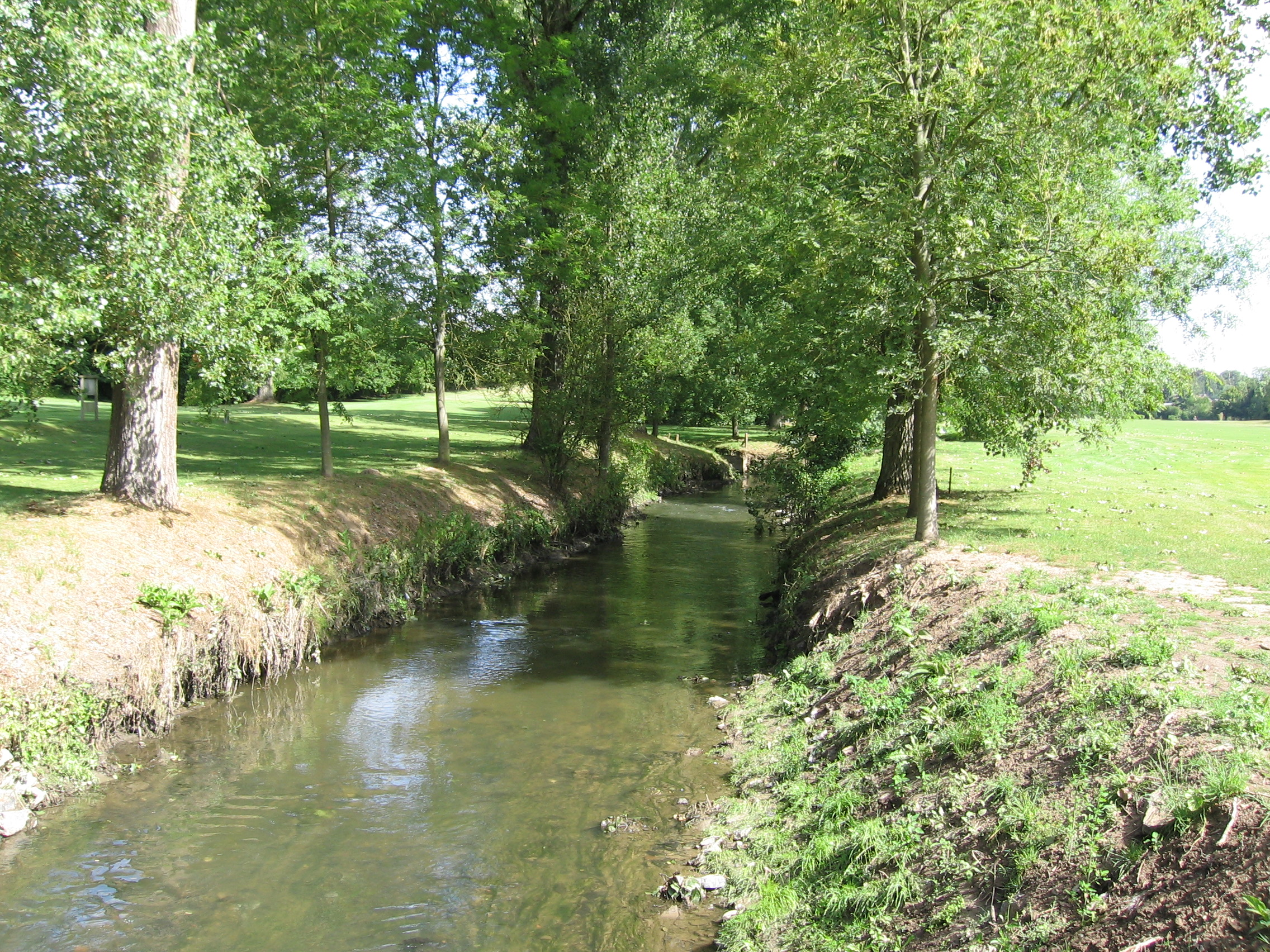 L'Orneau passant près de la ferme de Falnuée, à Mazy (Belgique)